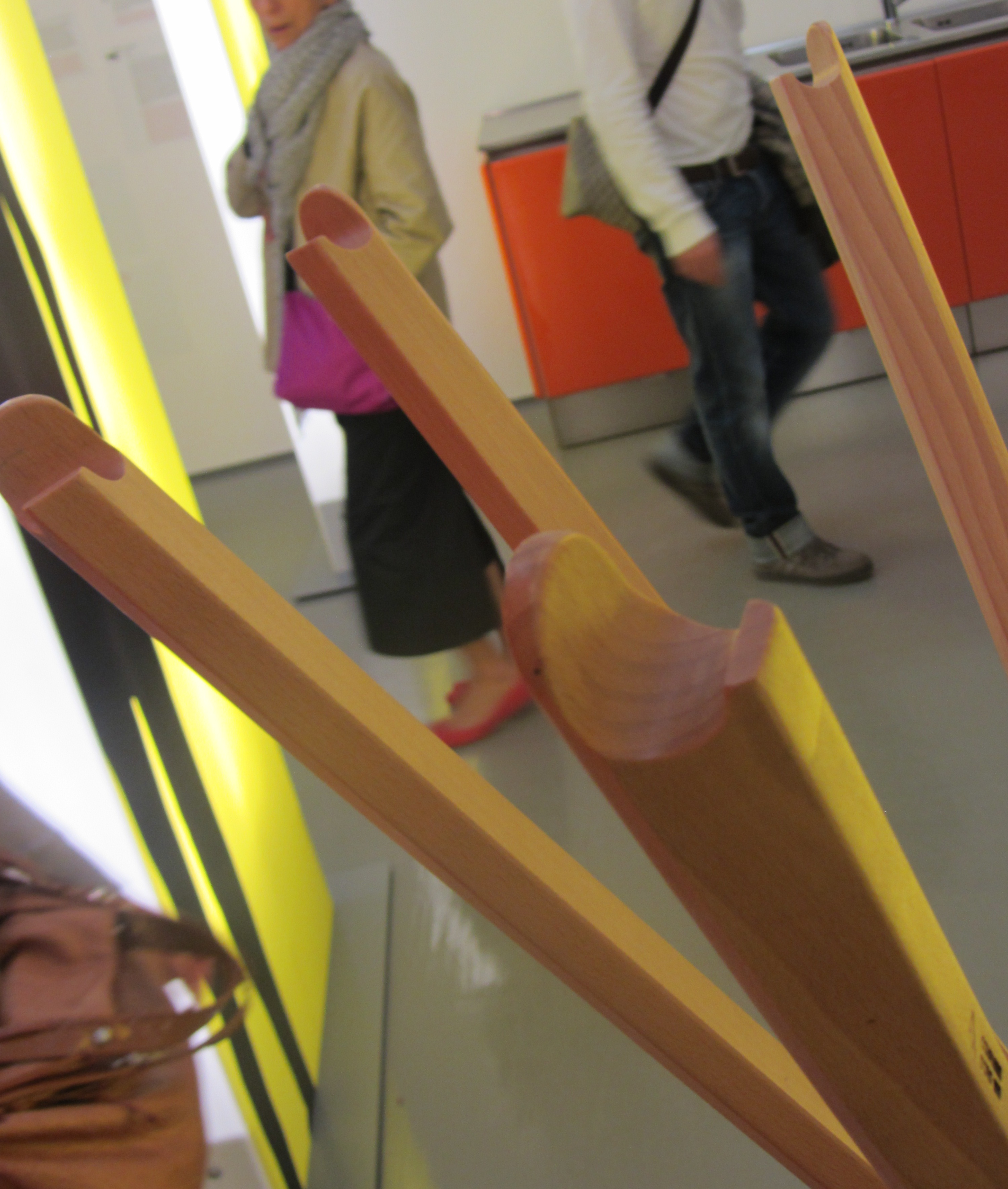 L'appendiabiti "Shangai" realizzato da De Pas, D'Urbino, Lomazzi per Zanotta nel 1973 e vincitore del premio Compasso d'Oro nel 1979. Appendiabiti chiudibile in legno